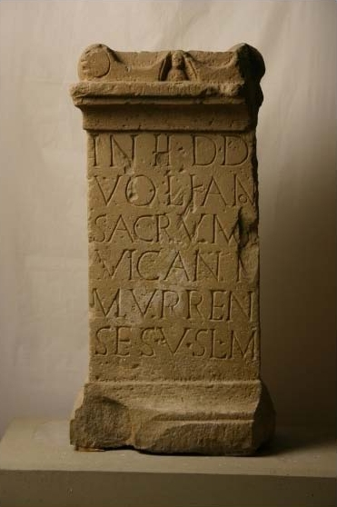 Altar für Vulkan, Benningen am Neckar. Original: Römisches Lapidarium Stuttgart. Abbildung: Foto des Originals aus Museum digital.